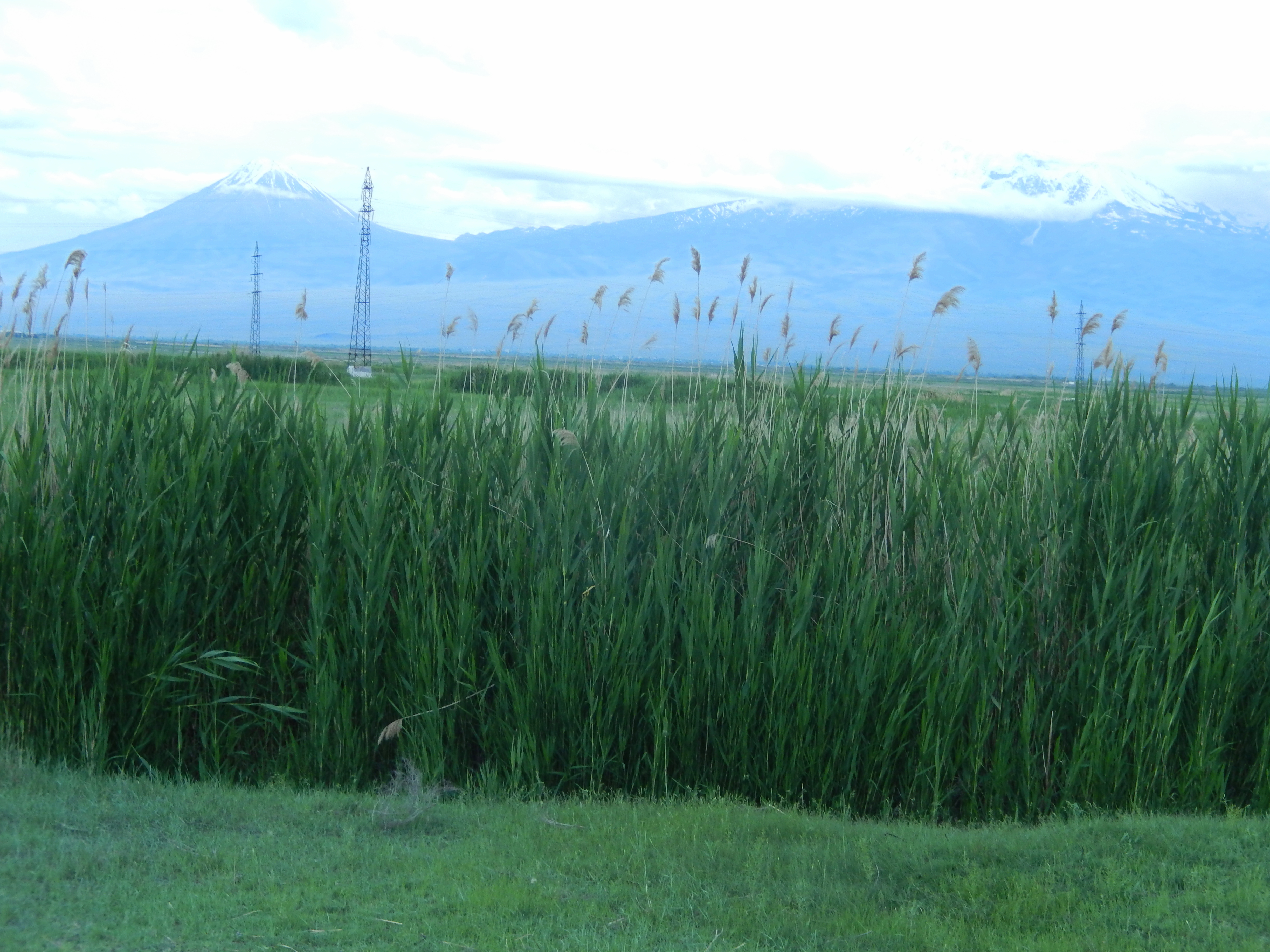 Խոր վիրապ արգելավայր